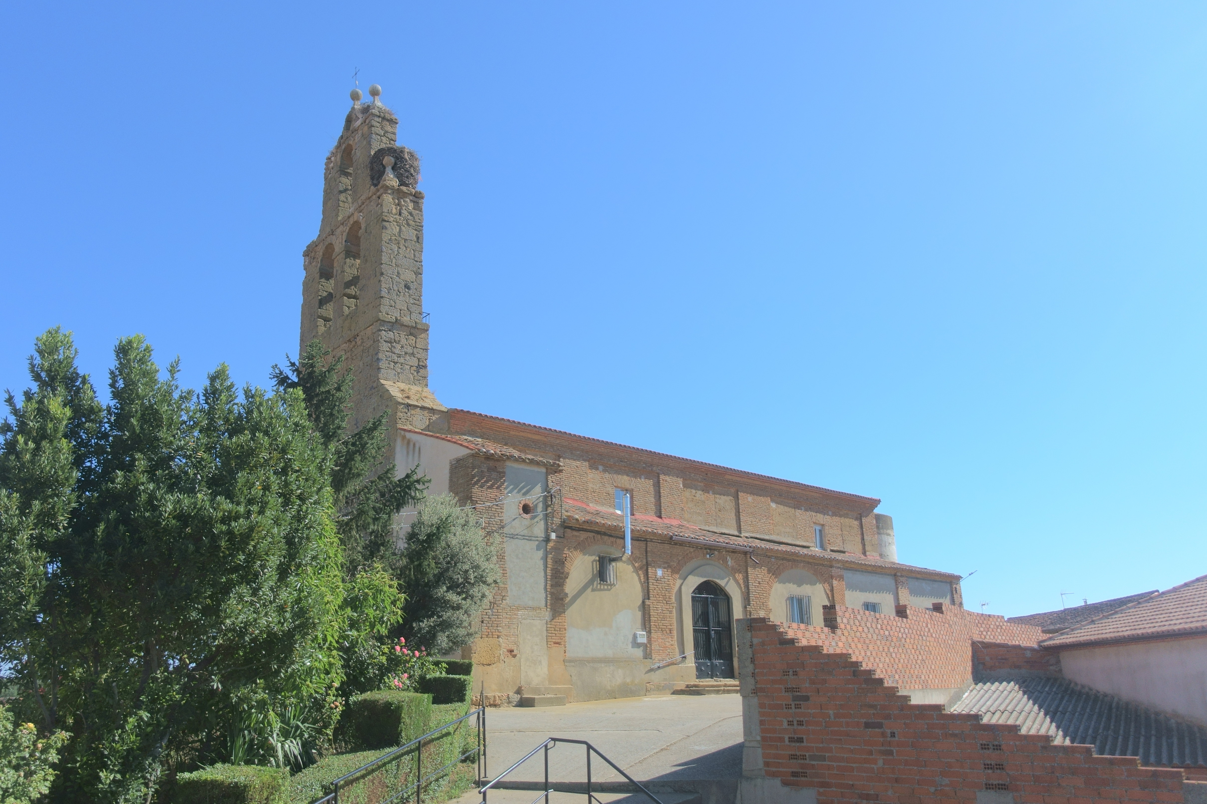 Iglesia de San Román, Vega de Villalobos (Zamora, España).